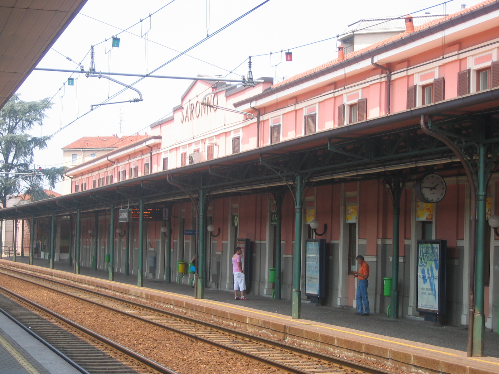 Saronno - train station